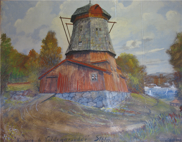 Fresk av Einar Hillberg föreställande Kvarnen på Valdemarsudde i Stockholm. En av de fresker som Einar Hillberg målade i sin sons, Ove Hillbergs, nybyggda hus i Eskiltuna 1953.